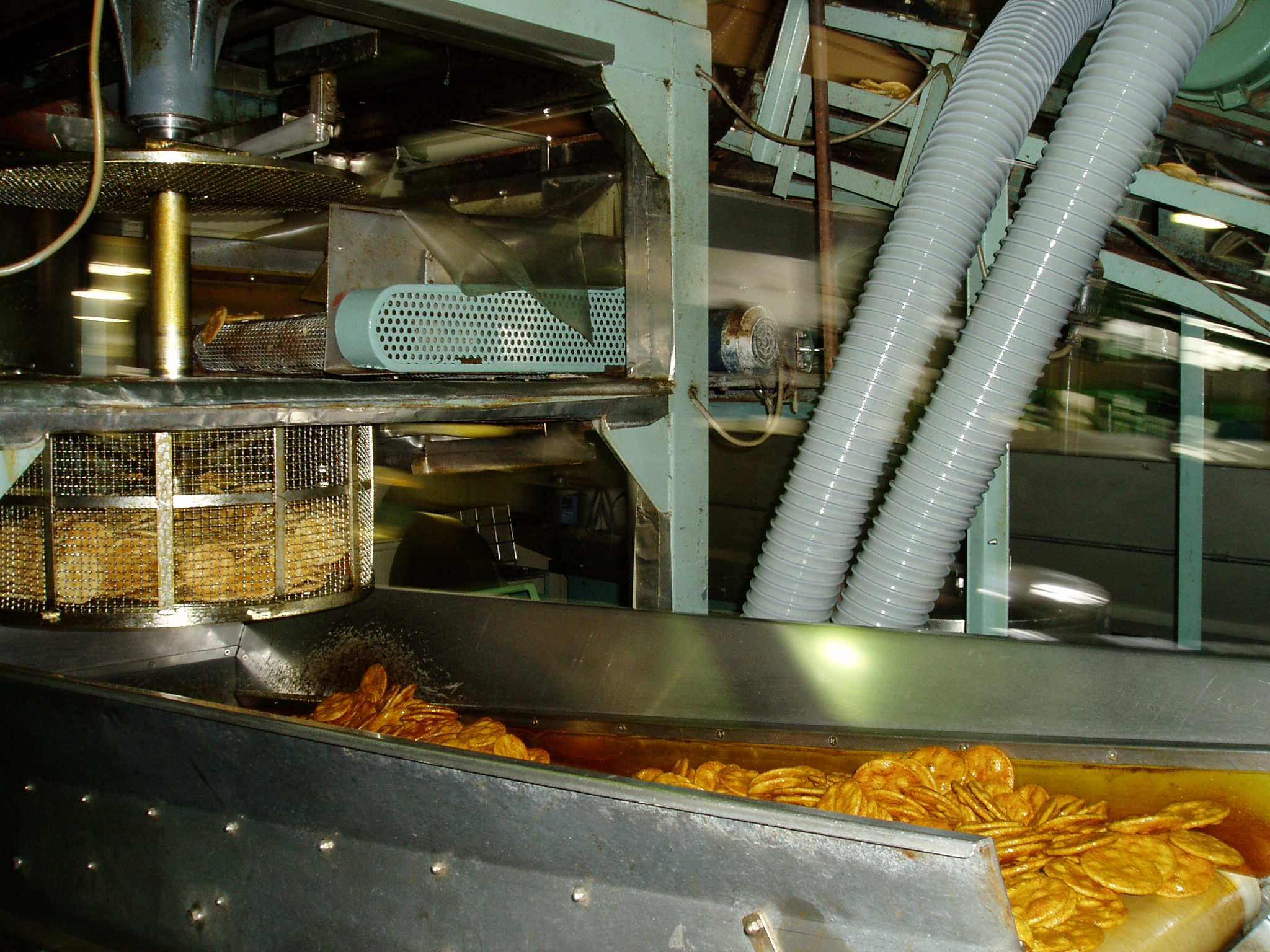 富山県射水市新湊漁港で取れた白えびを混ぜたせんべい